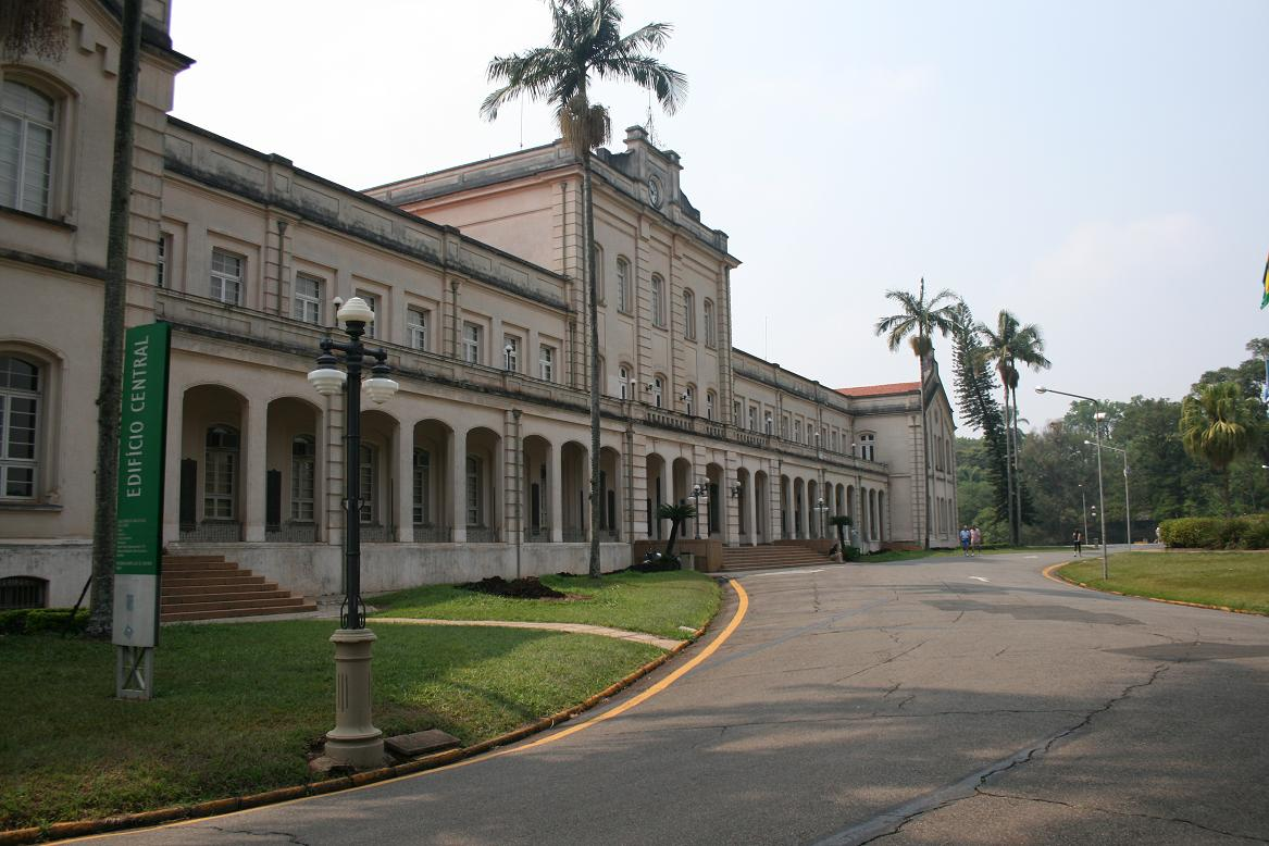 Edifício central da Escola Superior de Agricultura Luiz de Queiroz da Universidade de São Paulo, em Piracicaba, Brasil.